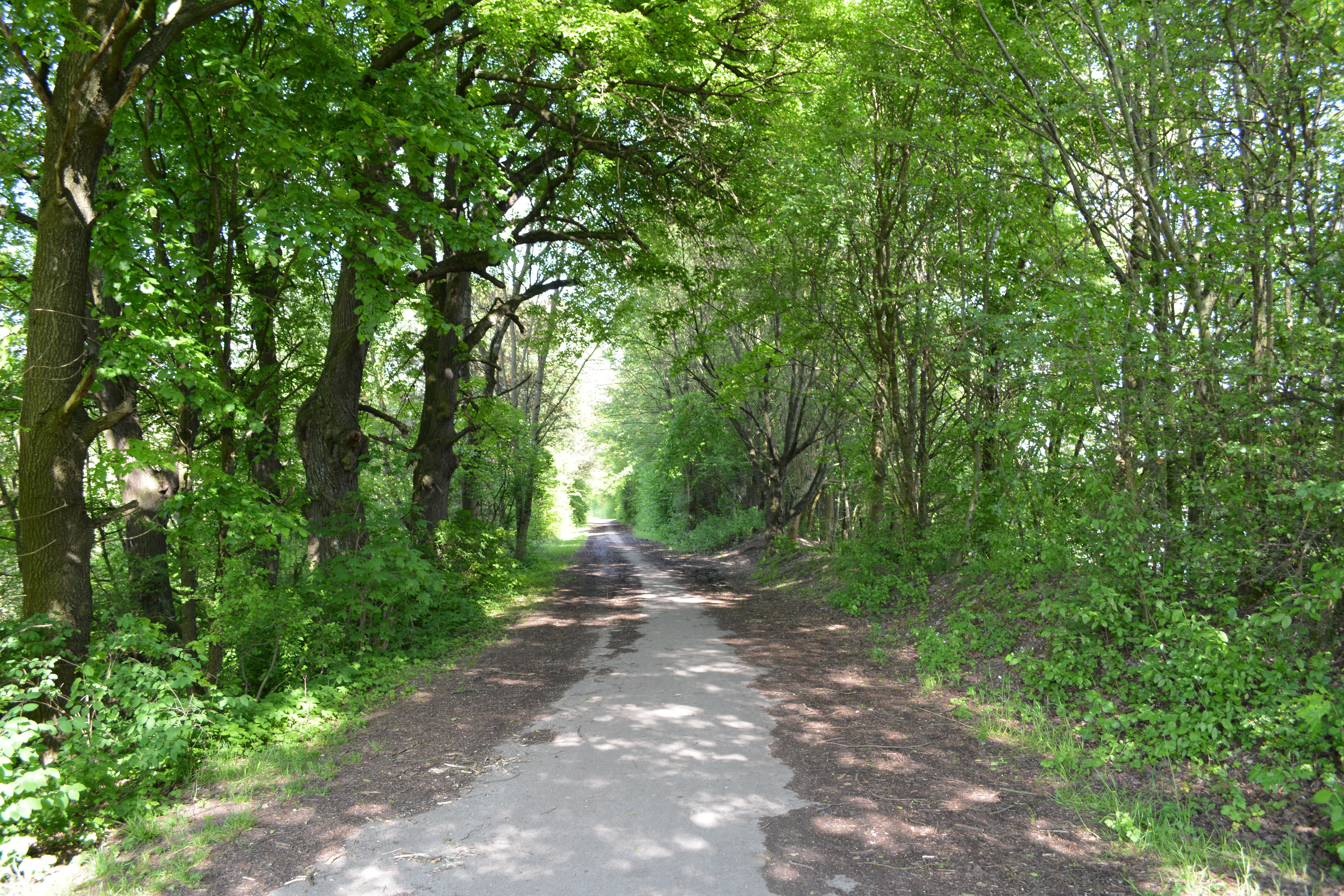 Weg im Landschaftsschutzgebiet „Allacher Forst“ (LSG-00120.06)